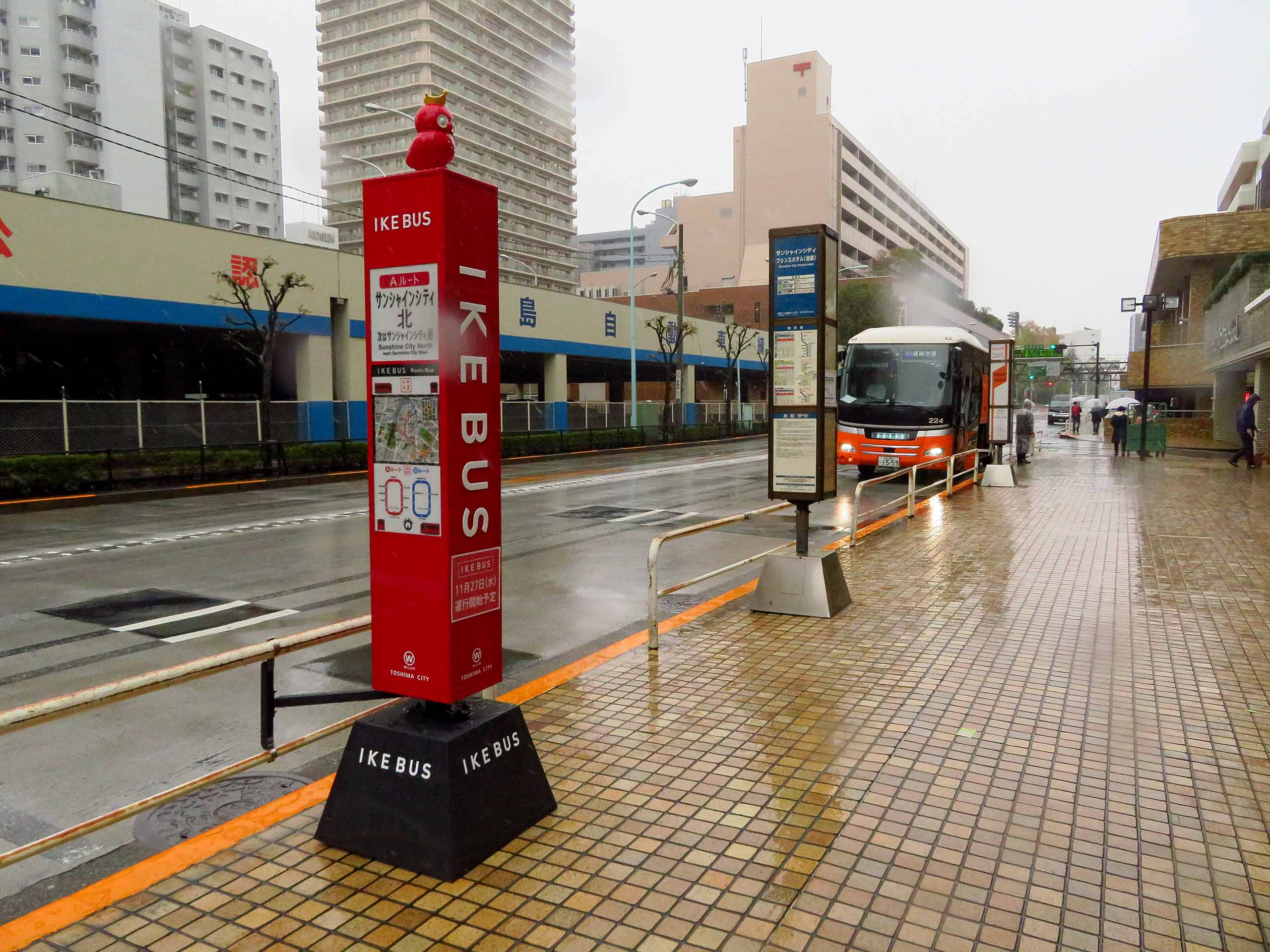 サンシャインシティプリンスホテルのバス停。東京空港交通の羽田空港・成田空港行きリムジンバス、西武バスの高速バスが発着、2019年11月からはIKEBUSのサンシャインシティ北停留所が設置される。